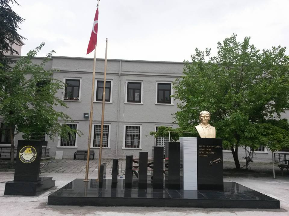 2016 yılında Ankara Lisesi